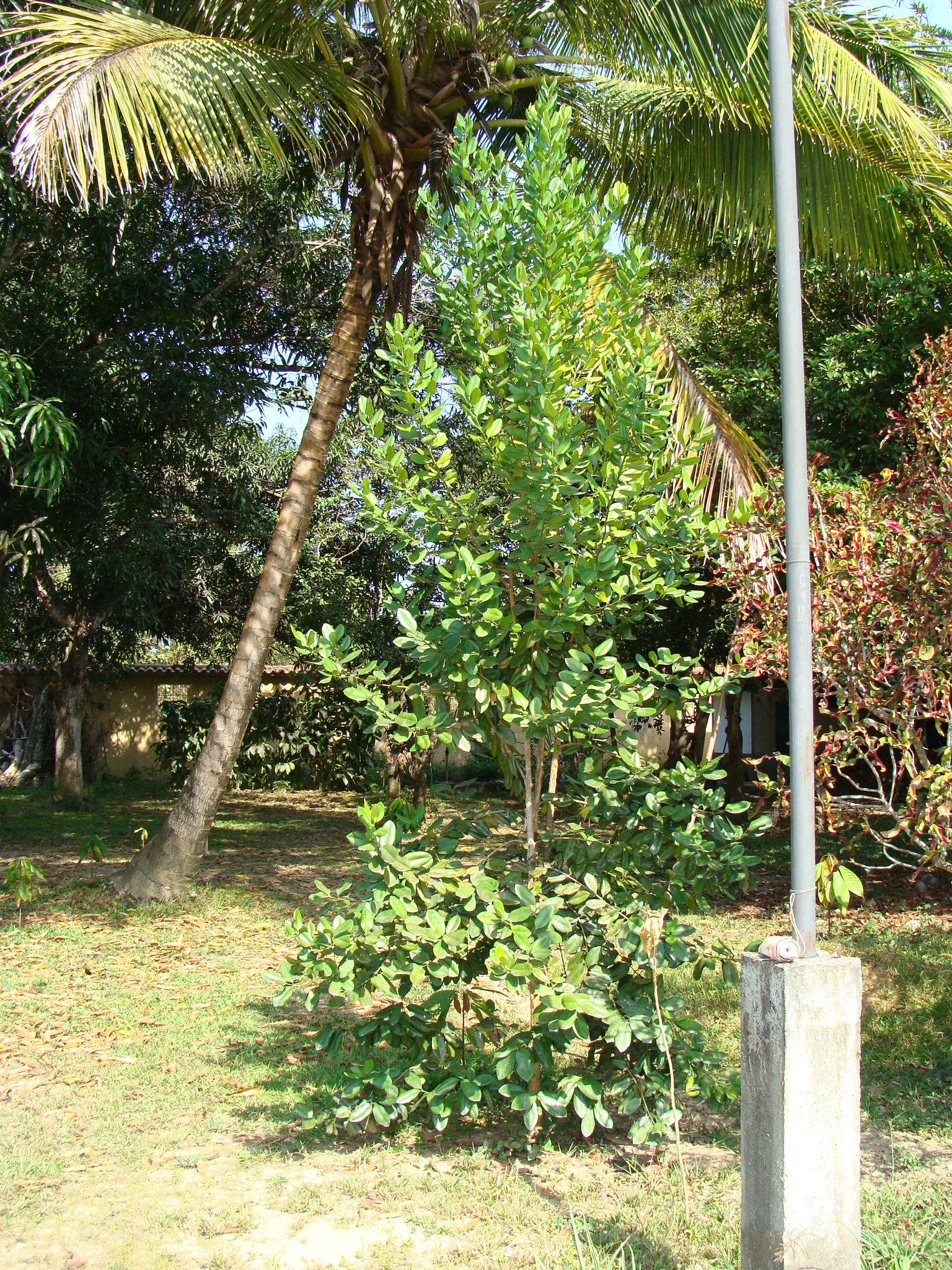 Planta de bayrum o malagueta, en un jardín en Curiepe, estado Miranda, Venezuela